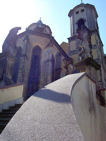 Hl. Nikolauskirche in Cheb